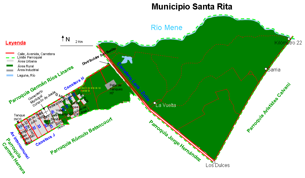 Mapa completo de la parroquia San Benito, municipio Cabimas, Estado Zulia, Venezuela